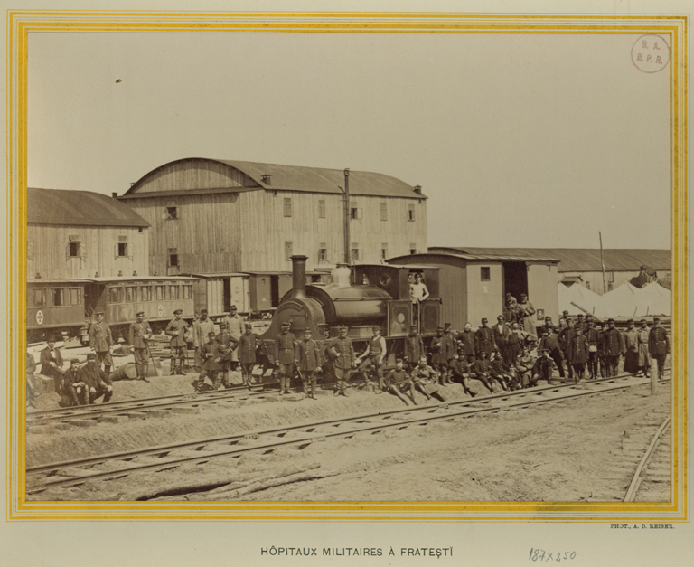 Строительство железной дороги Бухарест — Зимница, железнодорожные части (ЖДЧ) Русской императорской армии. From the album "La construction des chemins de fer militaires de l'armée russe - Bucharest-Zimnicea" Hôpitaux militaires à Frateşti